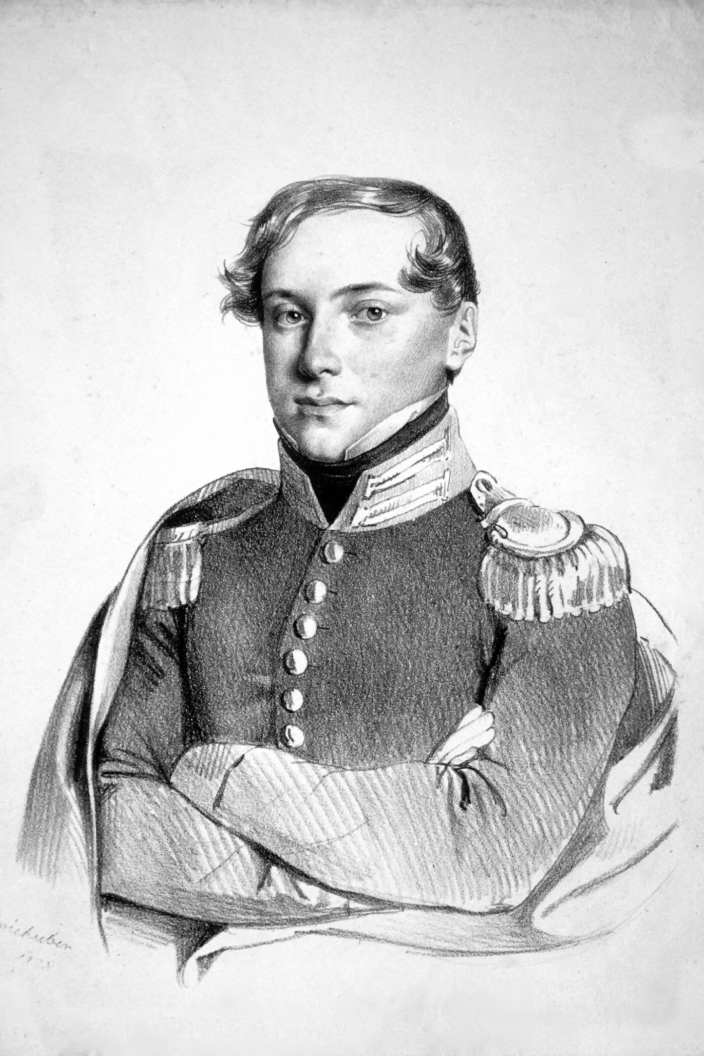 Franz Xaver von Spiegelfeld (1802-1885) . k. Kämmerer, wirklicher Geheimrat, Statthalter in Österreich ob der Enns. Lithographie von Josef Kriehuber, 1829, als Zögling des Theresianums.